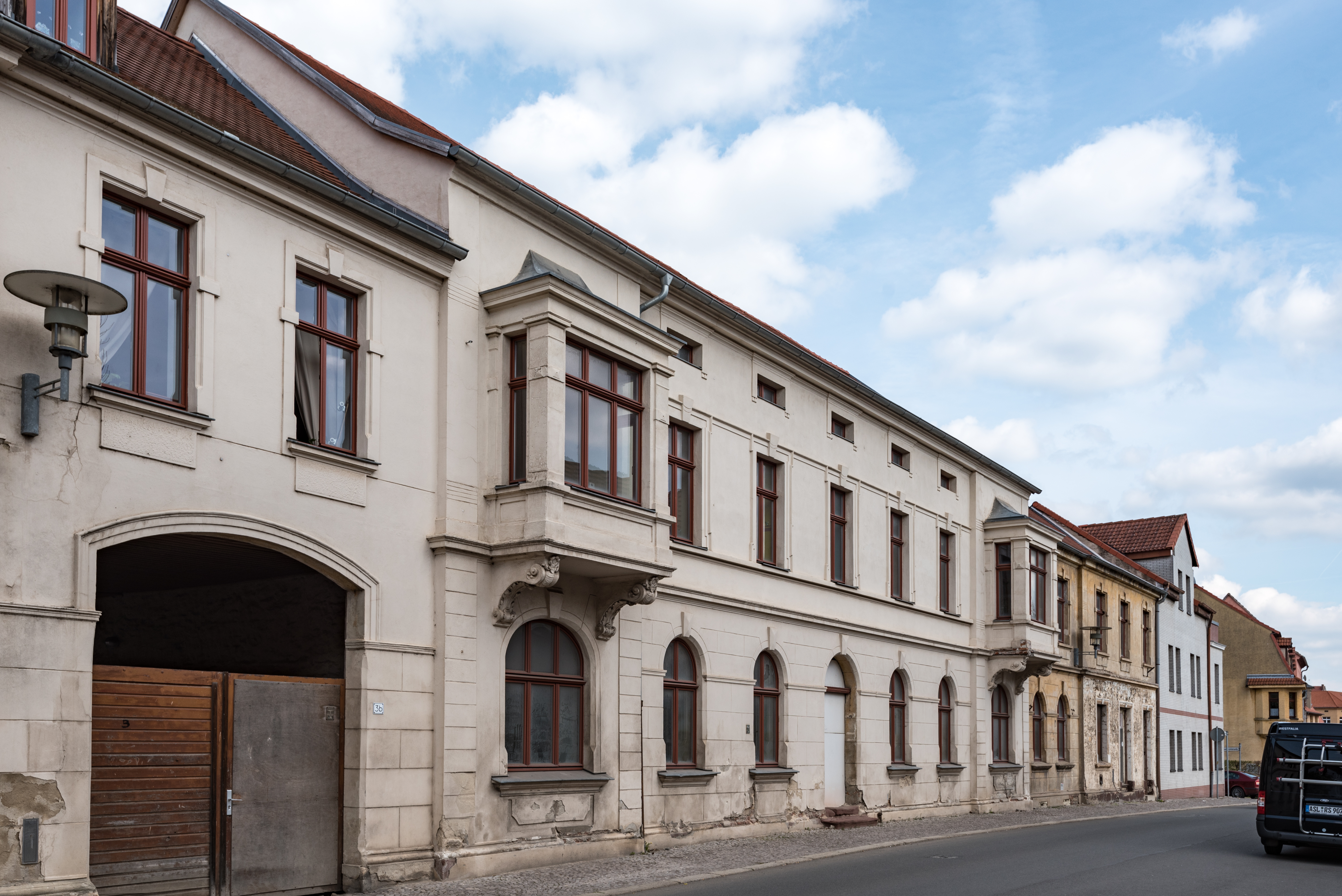 Aschersleben, Vor dem Steinthor 3